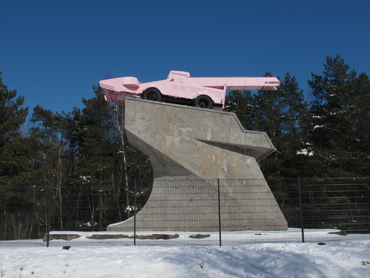 Sockel des ehemaligen sowjetischen Ehrenmals mit Schneelader nahe der Grenzübergangsstelle Drewitz / Dreilinden (Panzerdenkmal)